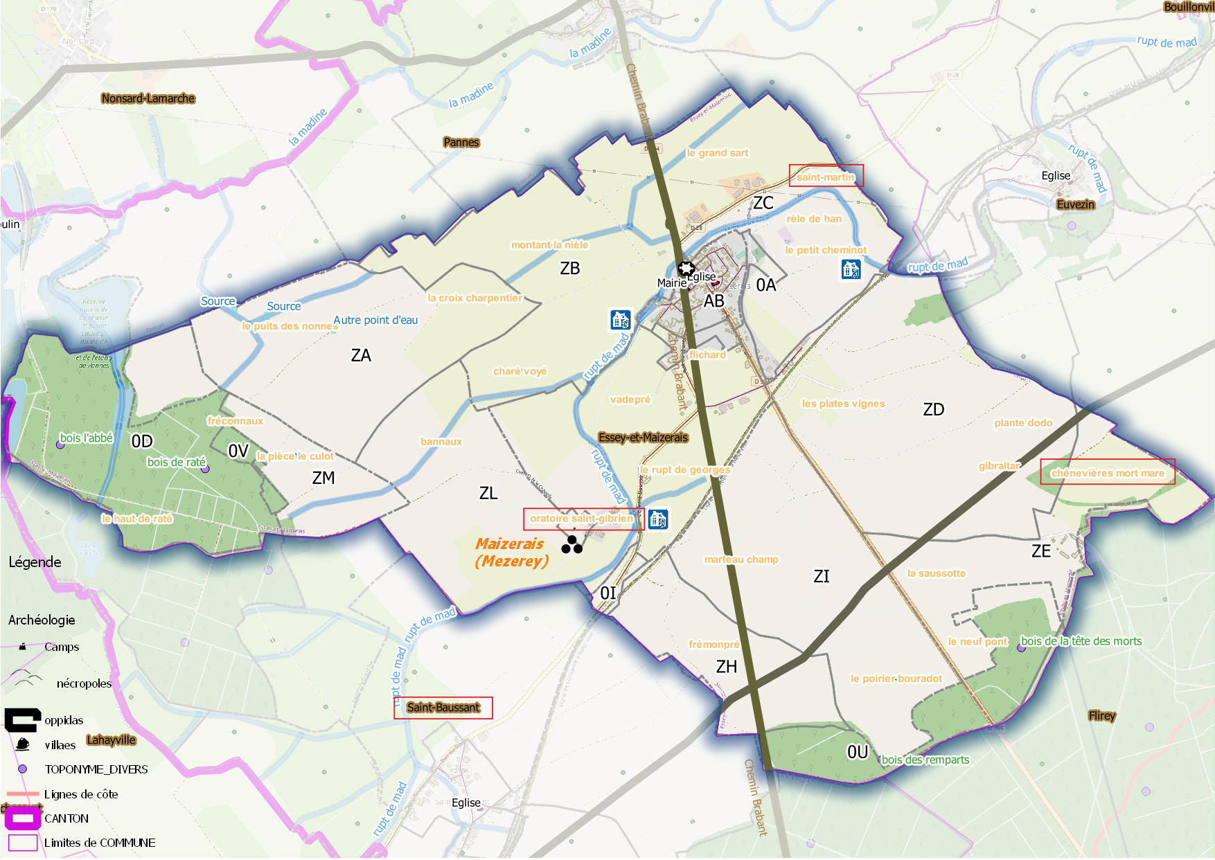 Essey et Maizerais (ban communal) Osm et Qgis, mentions additionnelles.